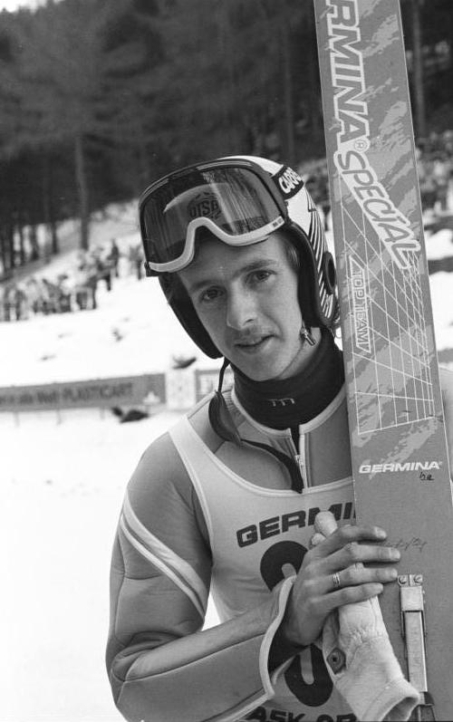 ADN-ZB / Thieme 31.1.89 Oberwiesenthal: 41. DDR-Skimeisterschaften Der 84-er Olympiasieger Jens Weißflog (SC Traktor) kam in seiner Heimatstadt überzeugend zum Meistertitel auf der Normalschanze. Die Kampfrichter zogen erstmals in dieser Saison dreimal die Note 19,5.